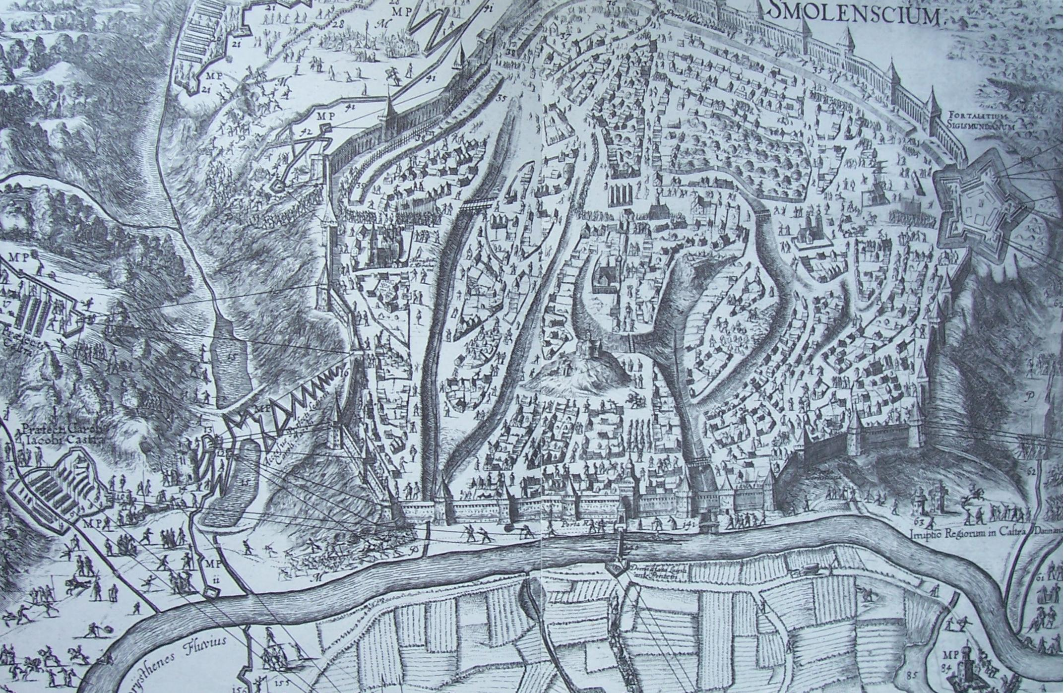 Центральная часть гравюры «План осады Смоленска». Данциг. 1636